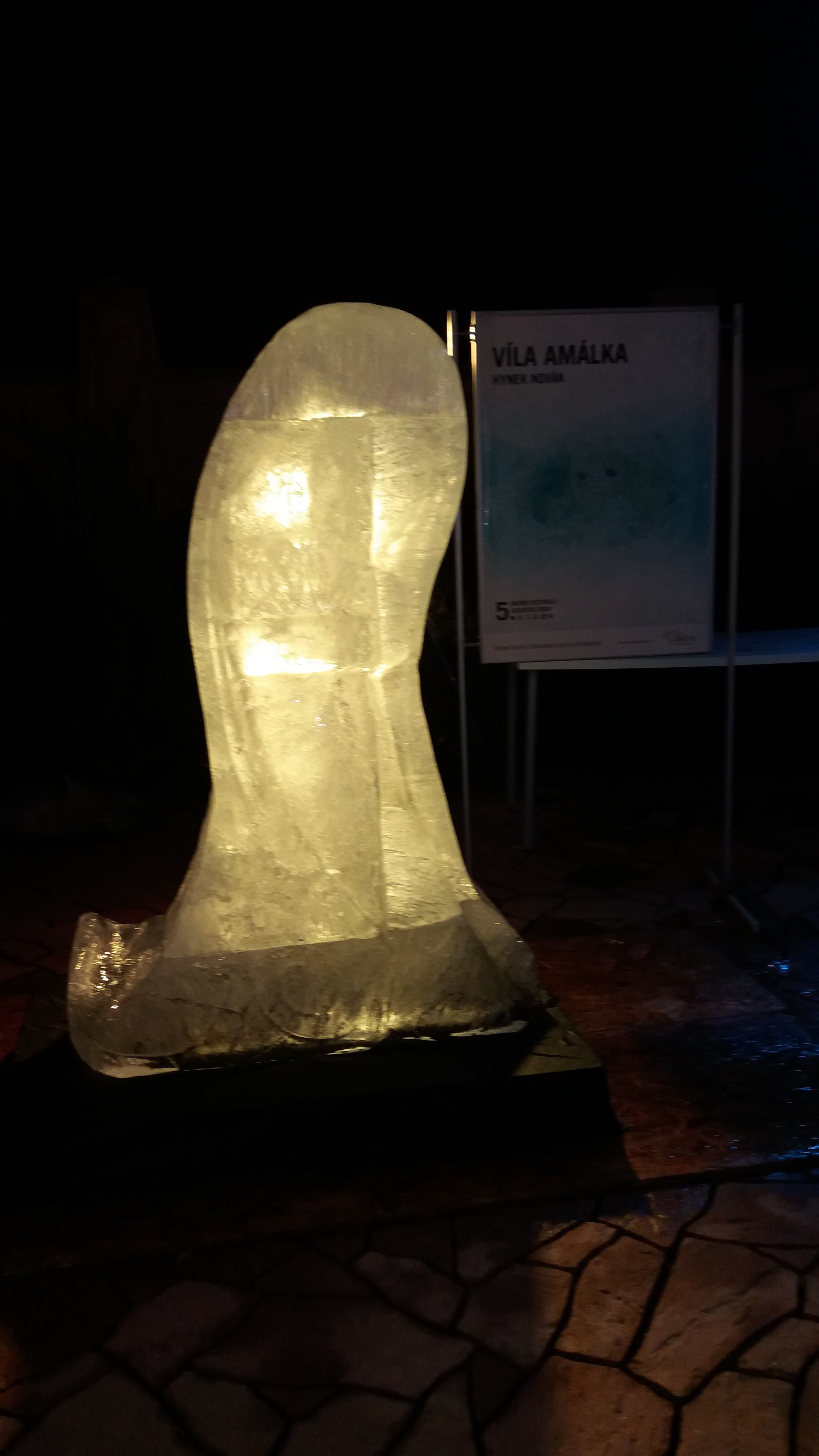 Postavička víly Amálky vytvořená z ledu na Festivalu ledových soch na střeše pražského nákupního centra Galerie Harfa.